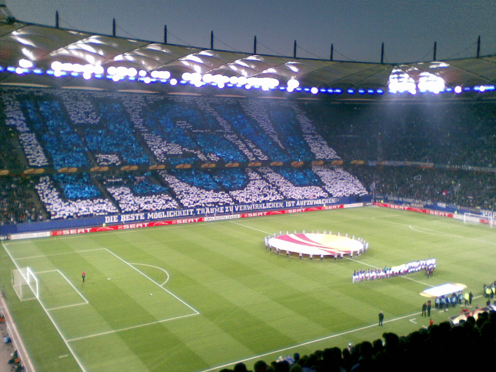 Einlauf der Mannschaften des Hamburger SV und des FC Fulham vor dem Europa-League-Halbfinale (Hinspiel) am 22. April 2010.